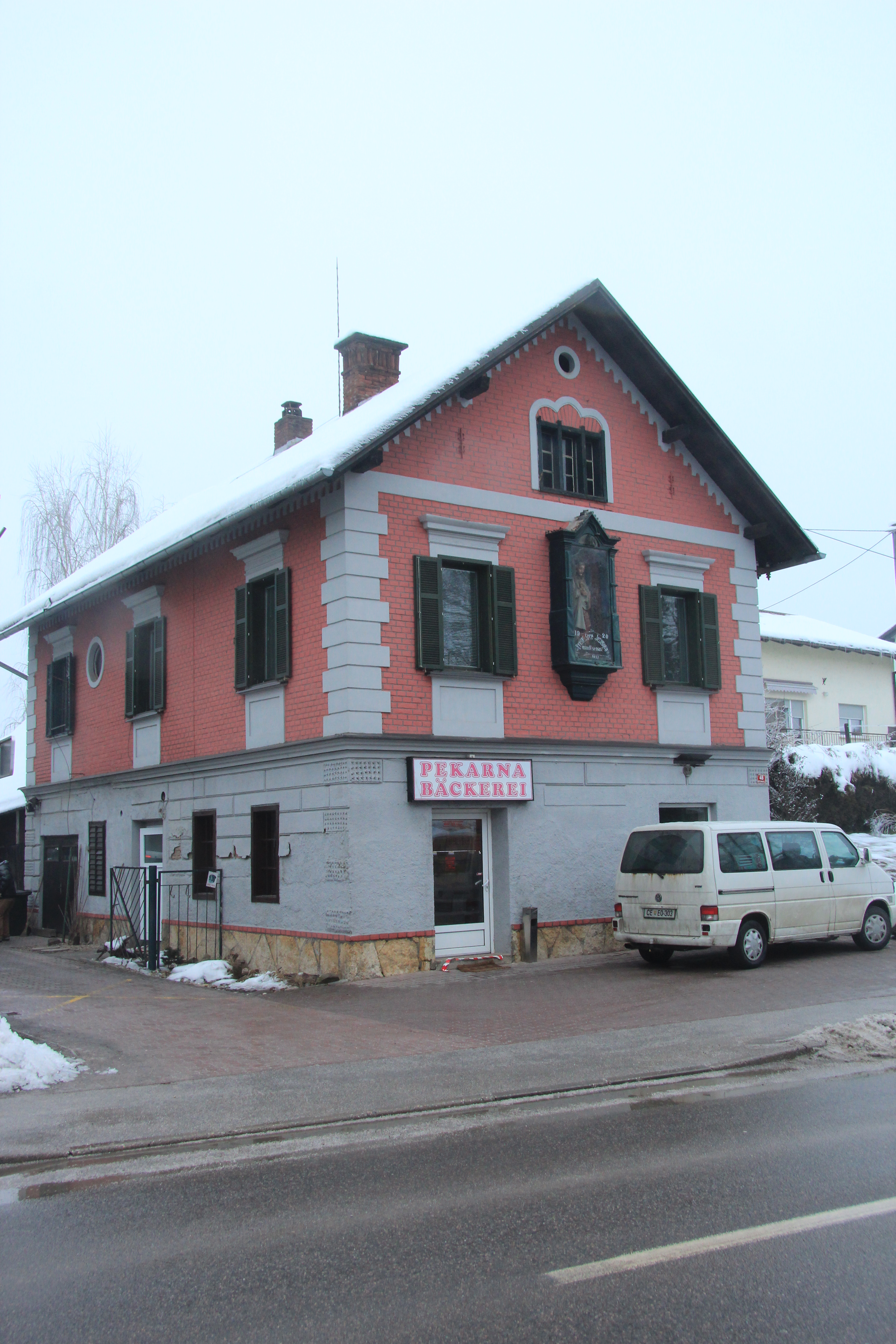 Ansichten aus Gornja Radgona (Oberradkersburg) an der slowenisch-österreichischen Grenze